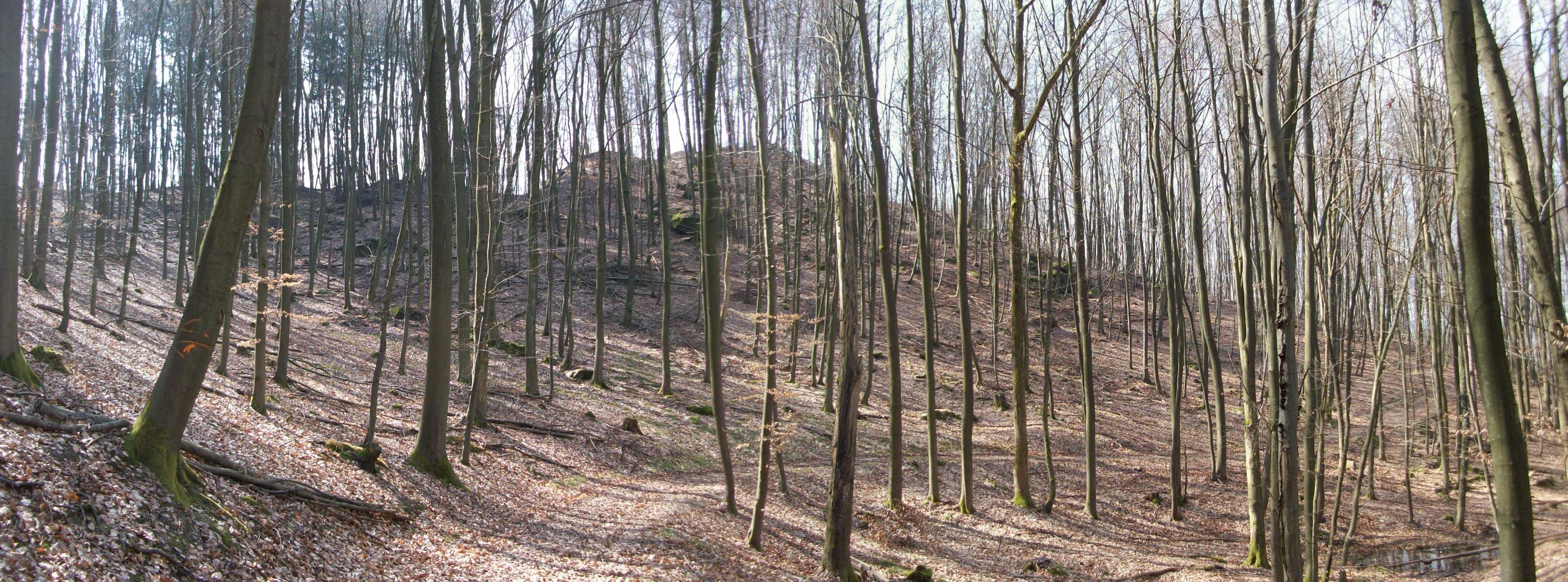 Blick auf den Burgstall von Nordosten (aus Richtung B47)